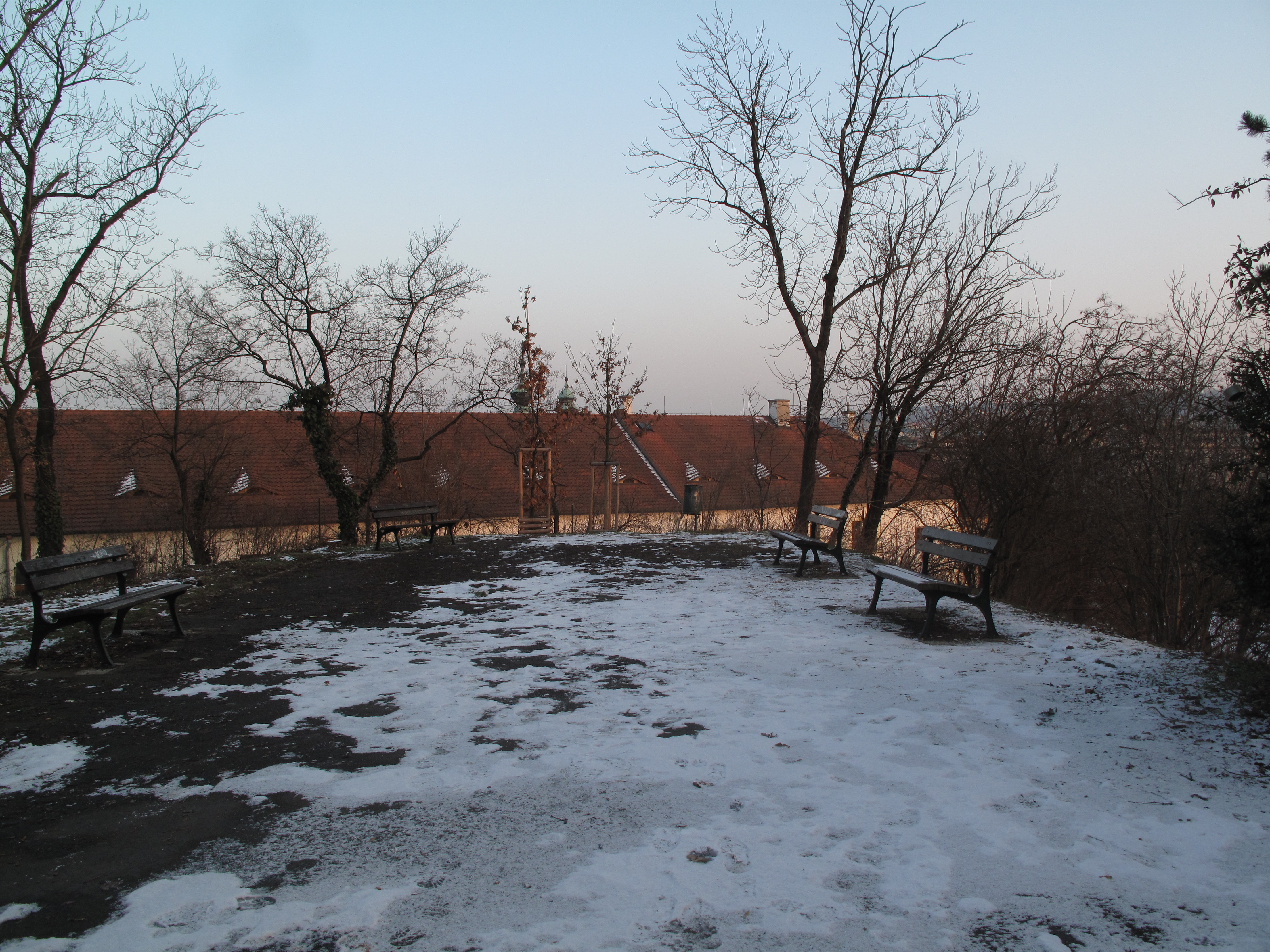 Thomayerovy sady